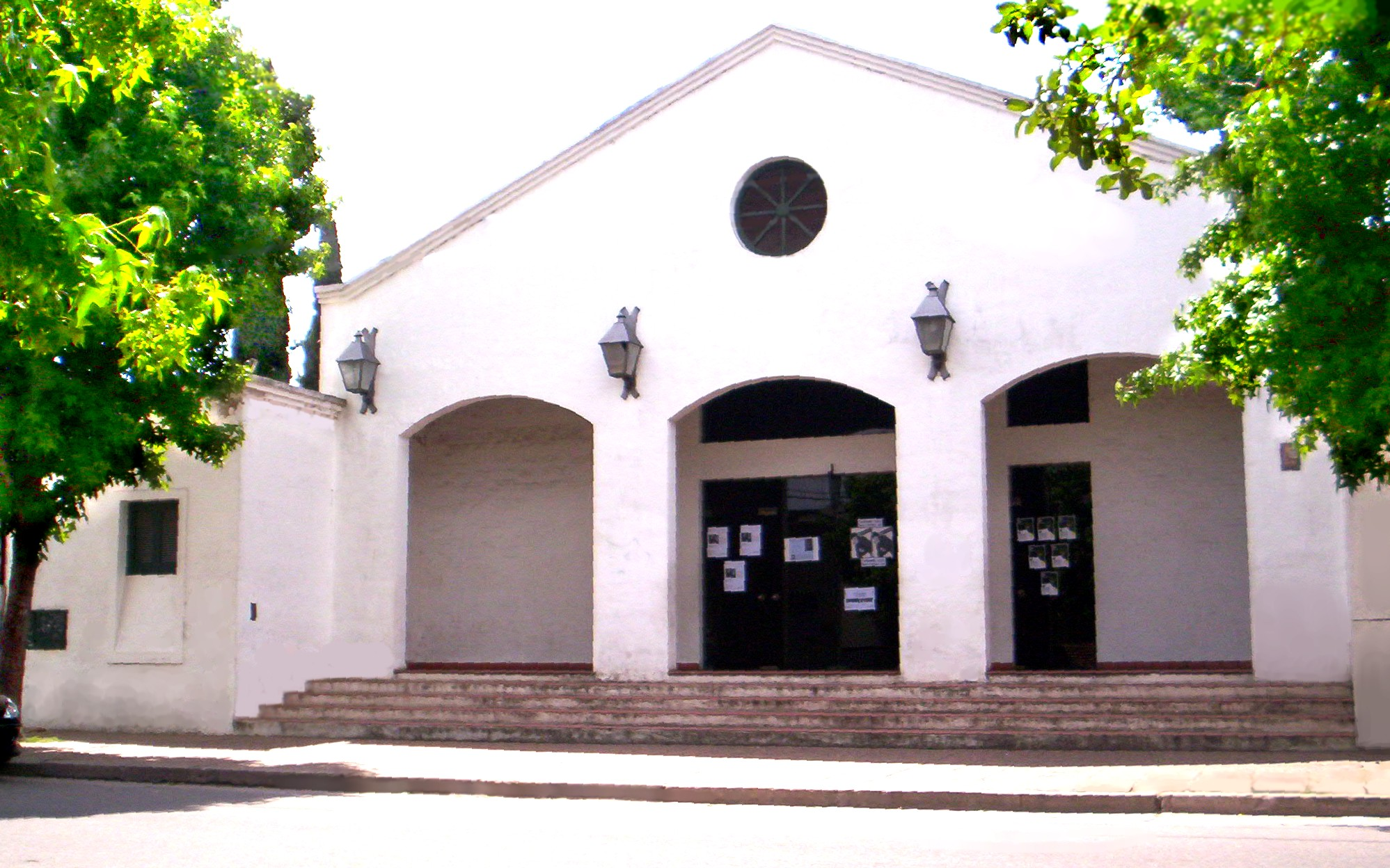 Fachada del Teatro de la Ranchería, en Junín, Argentina.